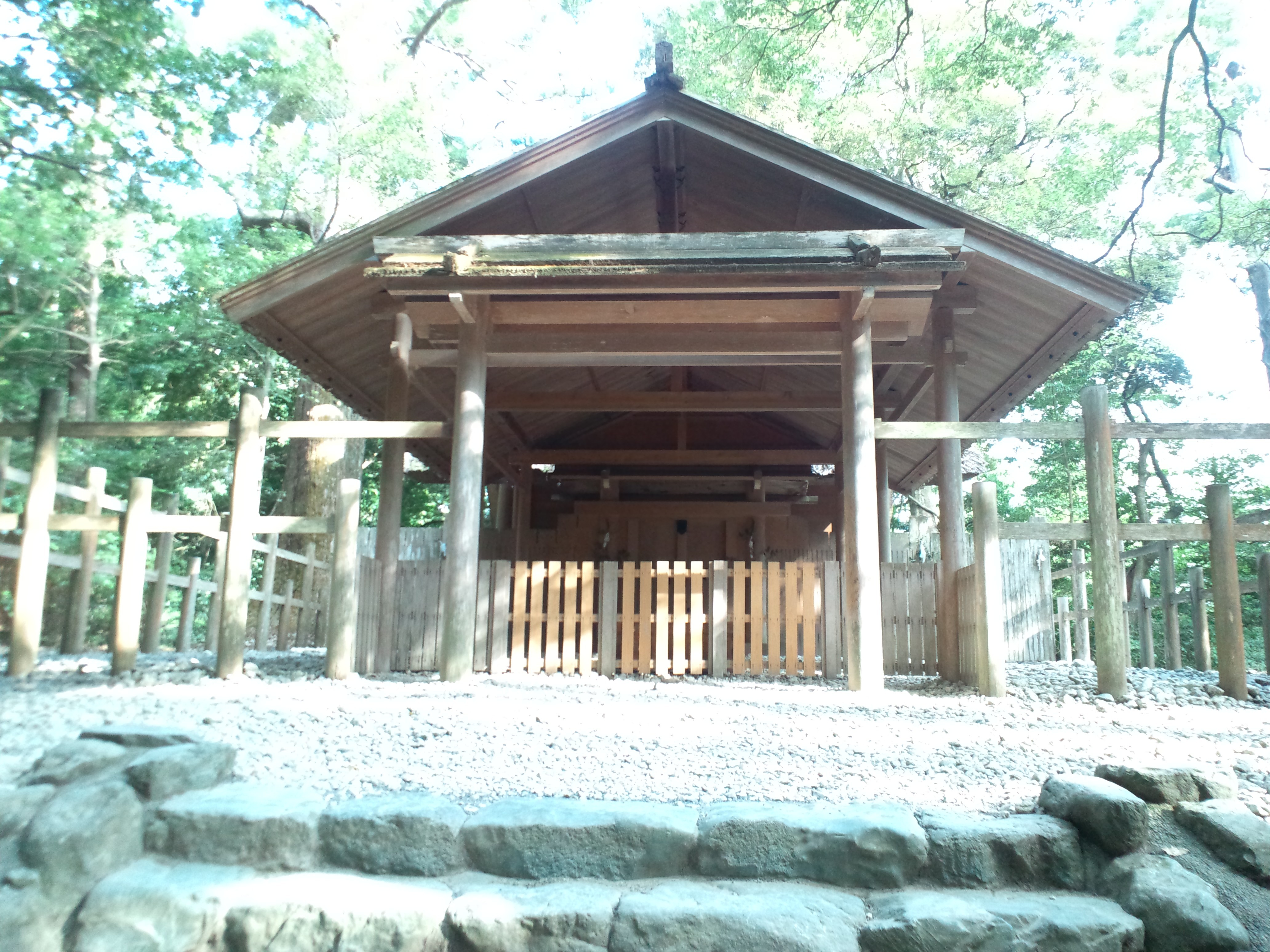 伊勢神宮 外宮 多賀宮